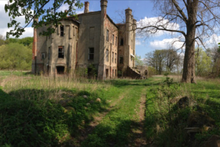 Das Gutshaus Goldenitz vor dessen Sanierung